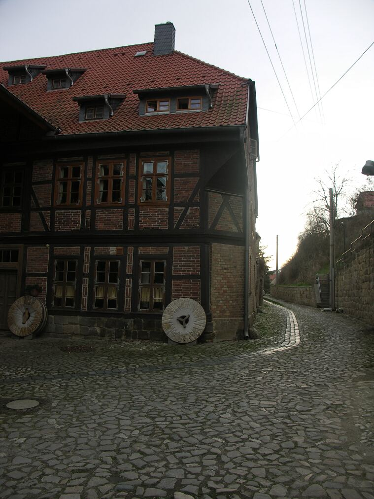 Ditfurt Muehle